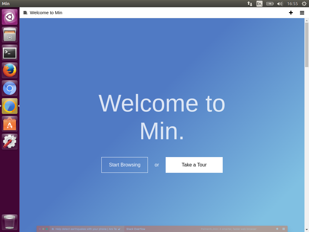 Portada inicial del navegador web.